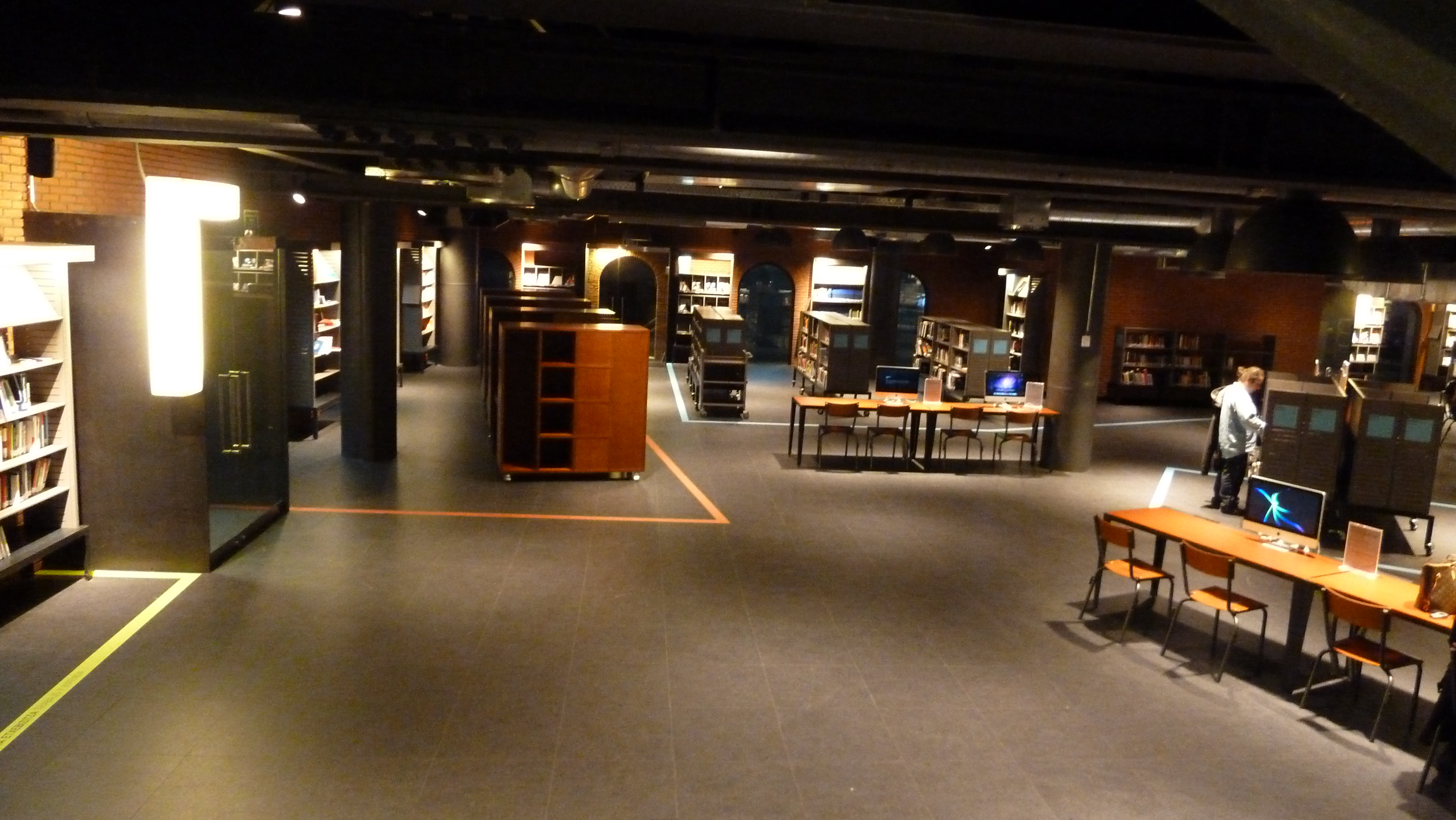 mediateca alhóndiga bilbao